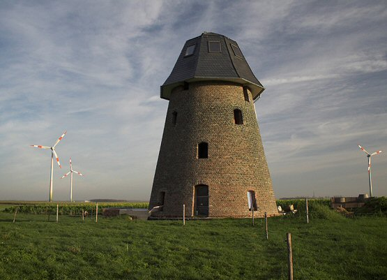 Löckener Windmühle